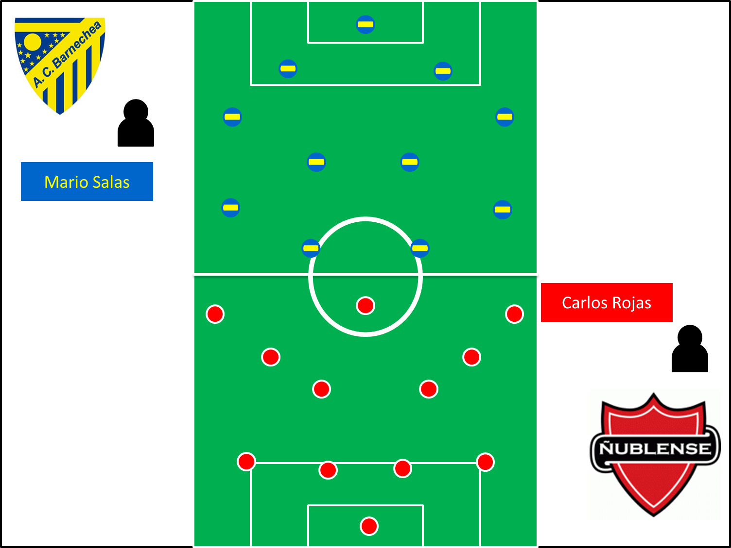 Partido de fútbol